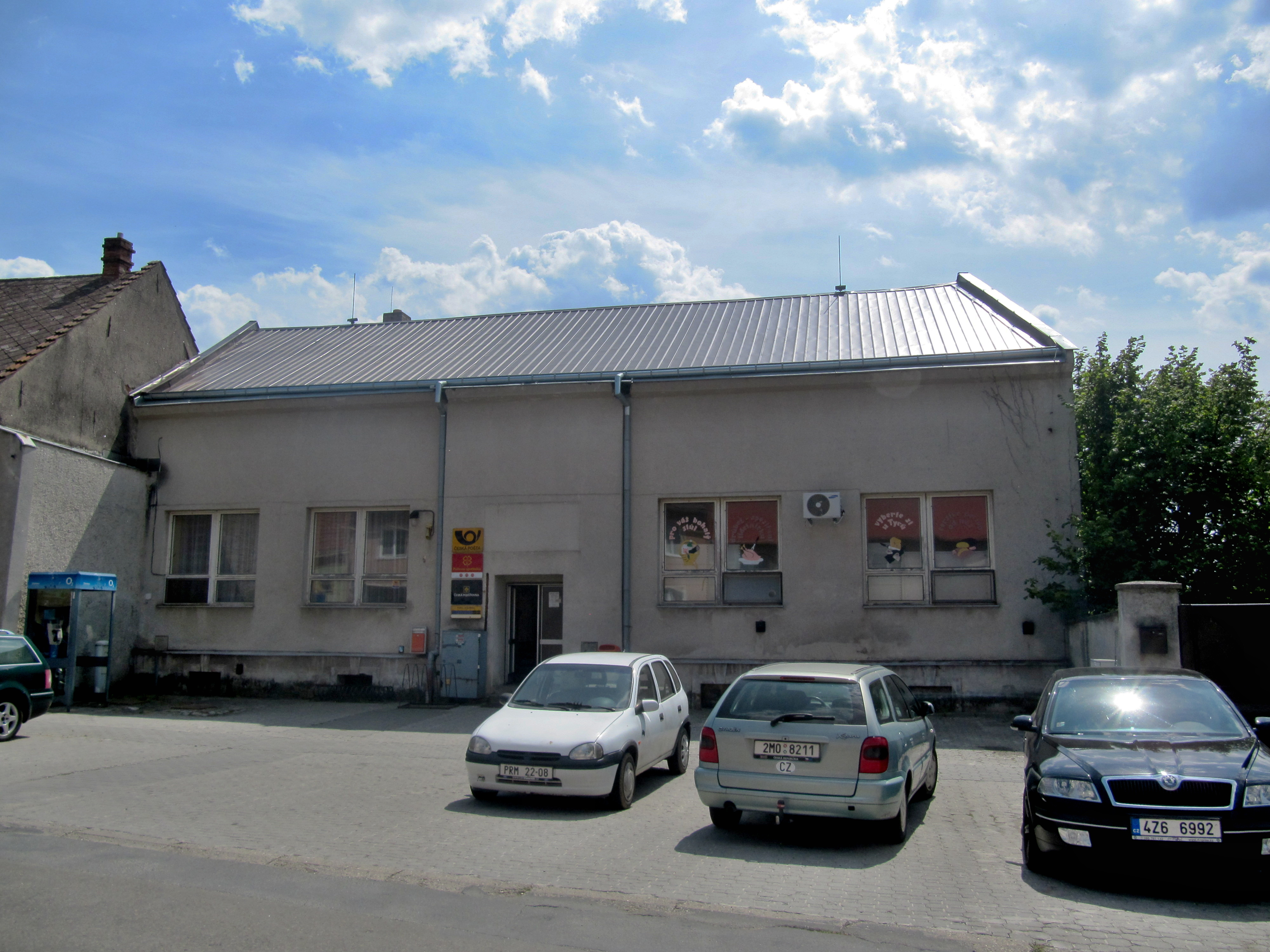 Horní Moštěnice, okres Přerov, Česká republika.